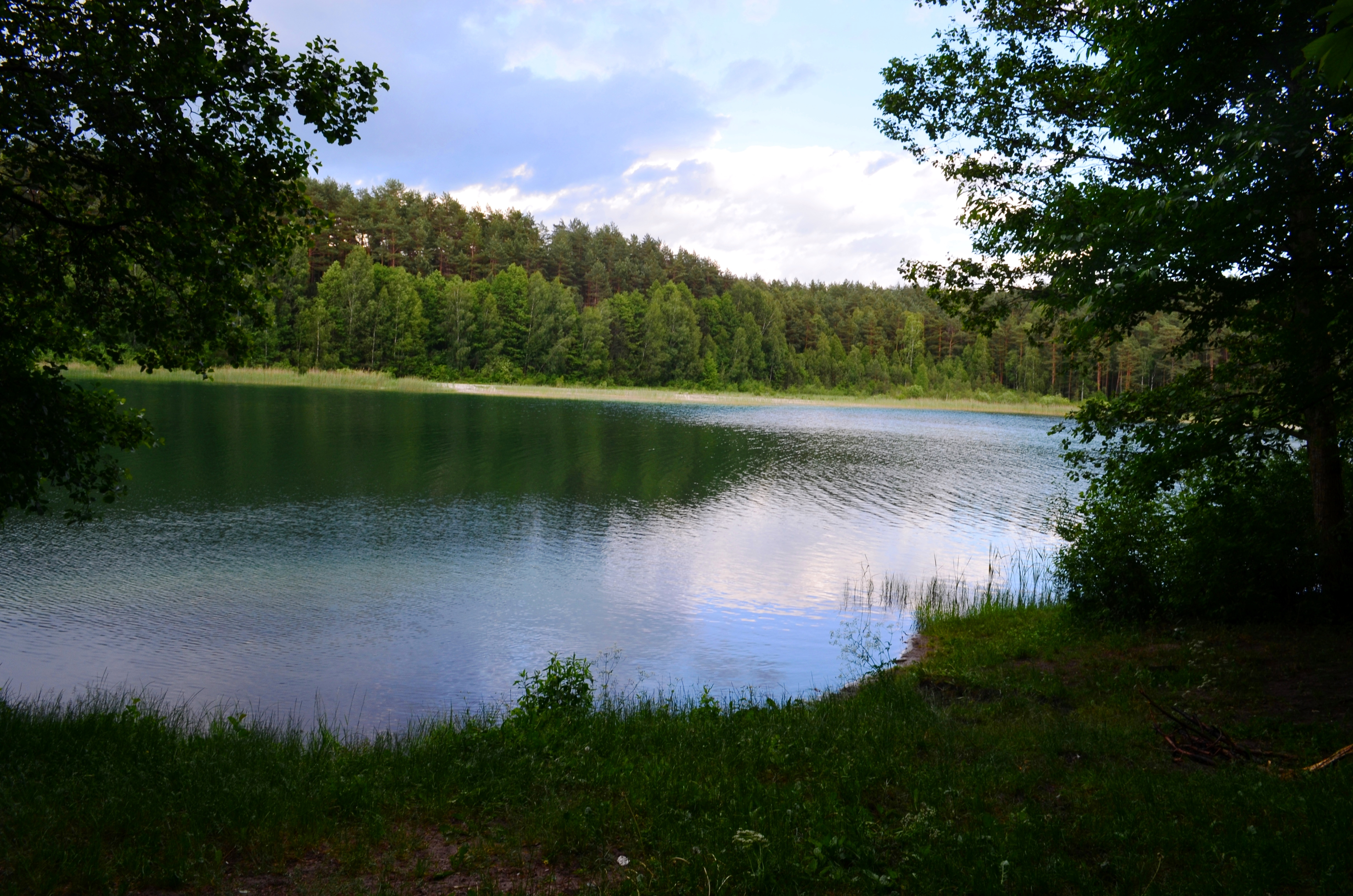 Ežeras Gėla, Vilniaus raj.